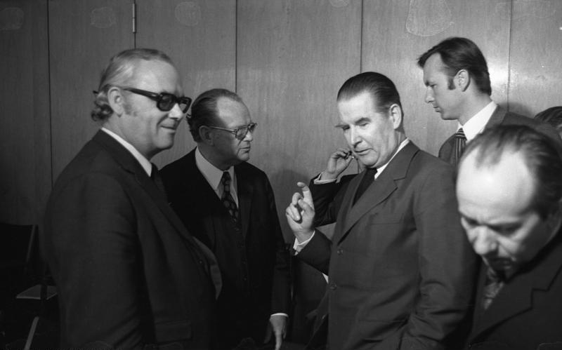 Als neuer Vorsitzender der CDU/CSU-Bundestagsfraktion wird Prof. Dr. Karl Carstens von K. G. Kiesinger vor dem CDU-Fraktionssaal des Bundestages vorgestellt. (v.l.n.r.: Wagner, Stücklen, Schröder)